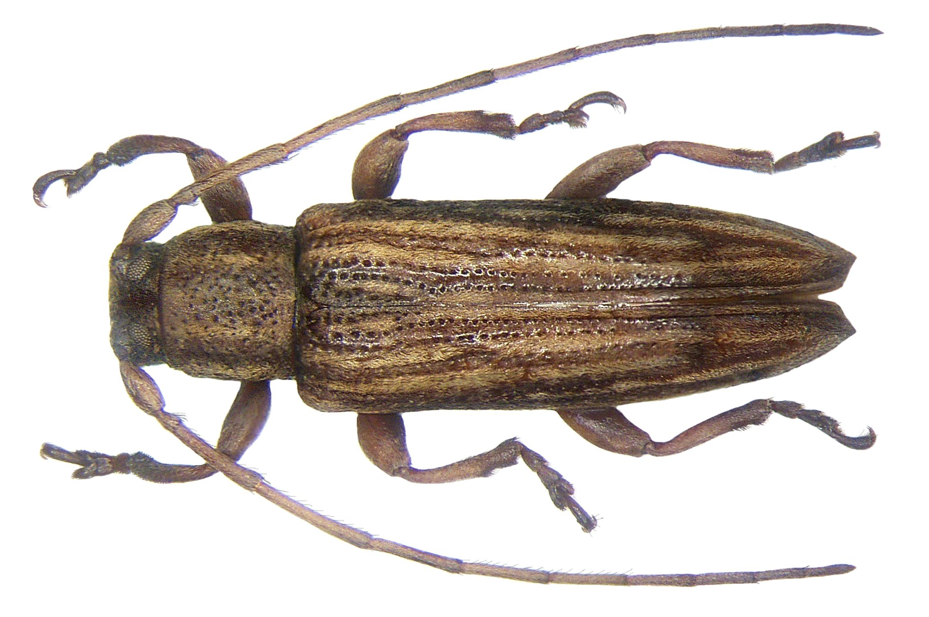 Familie: Cerambycidae Grösse: 8 mm Fundort: Vietnam, Hoa Binh Type, Coll. Museum Paris Foto: U.Schmidt, 2007